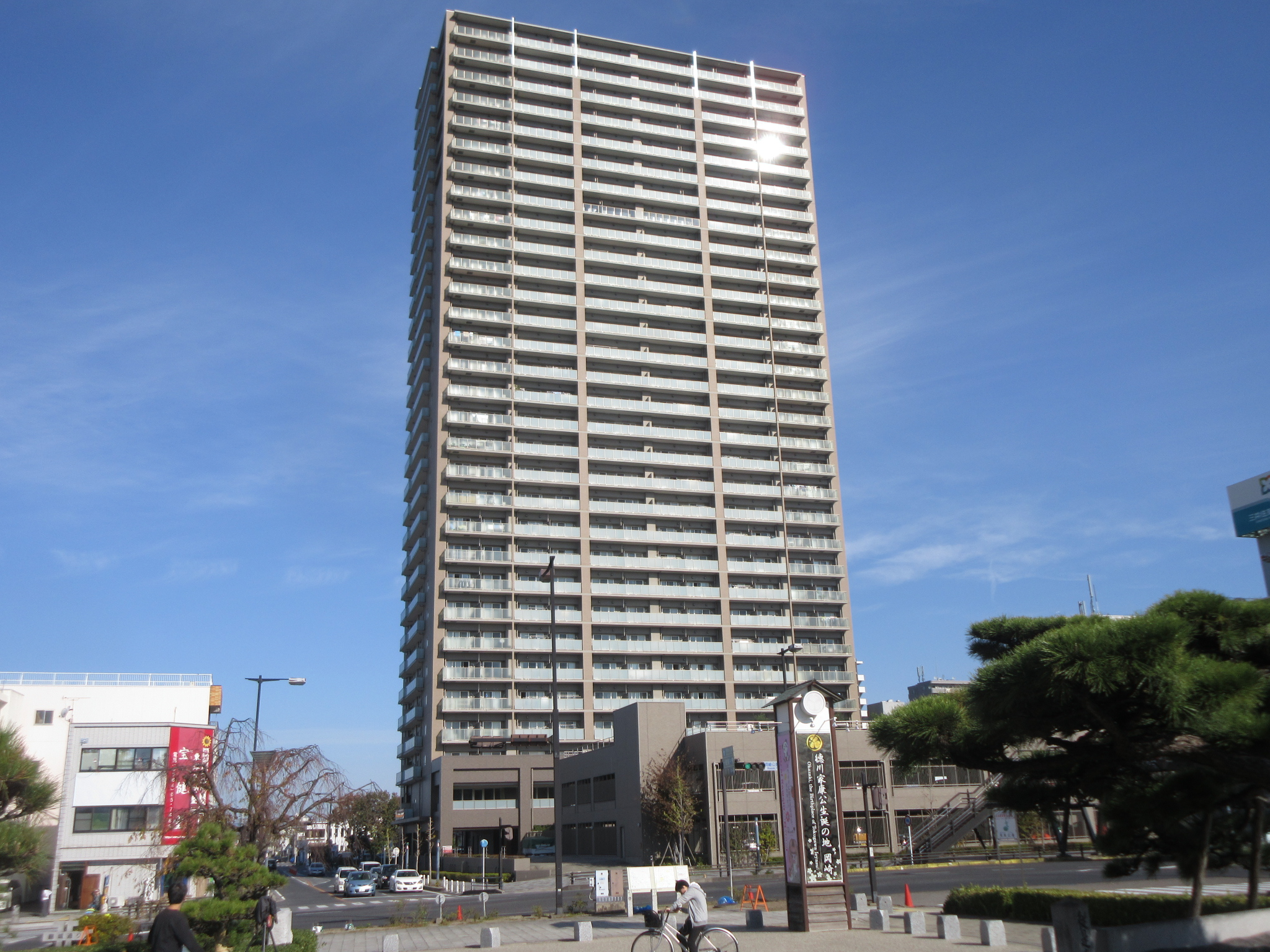 岡崎タワーレジデンス（岡崎市康生通西）